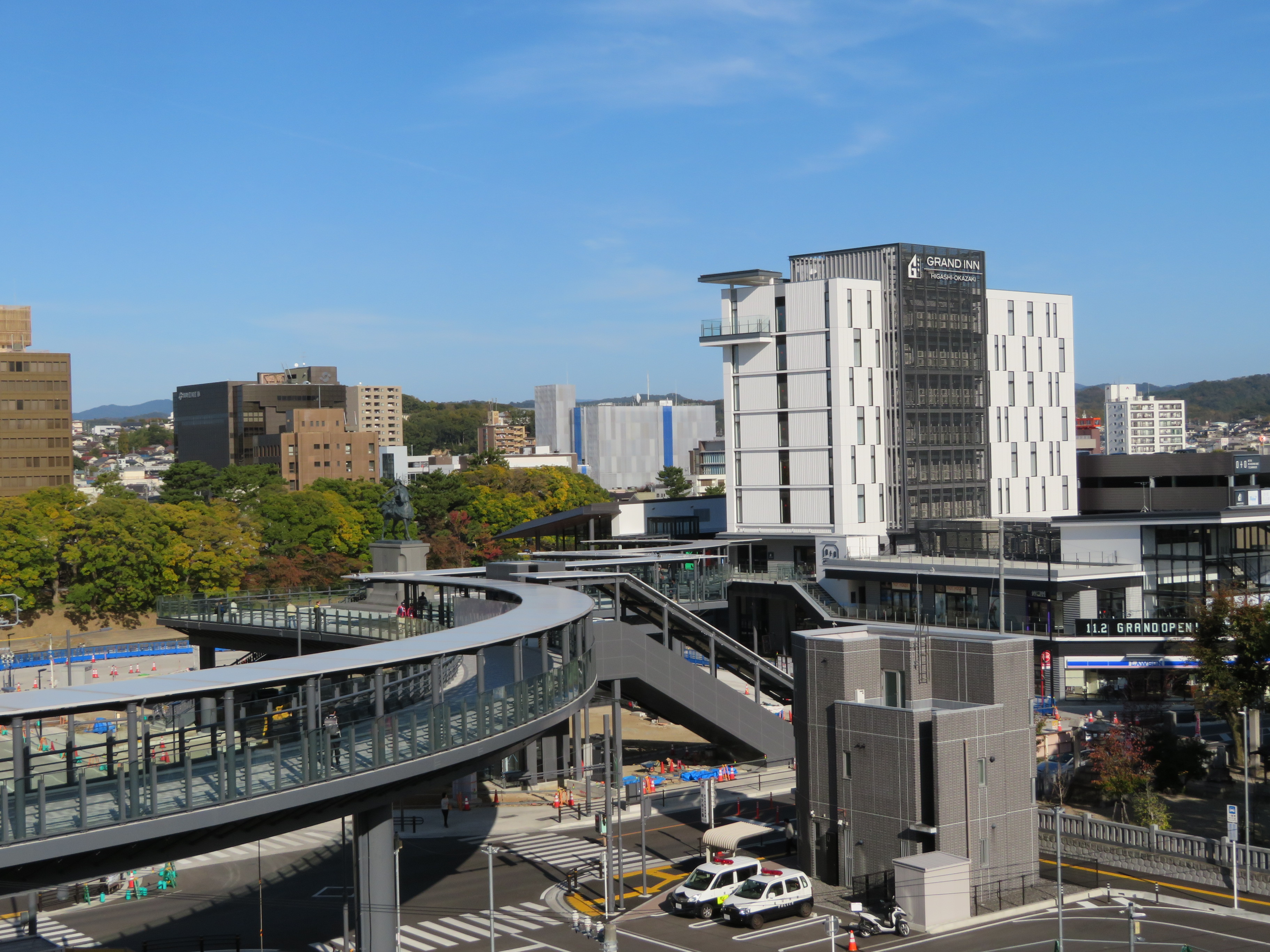 愛知県岡崎市。「オト リバーサイドテラス」とペデストリアンデッキ。2019年11月撮影。